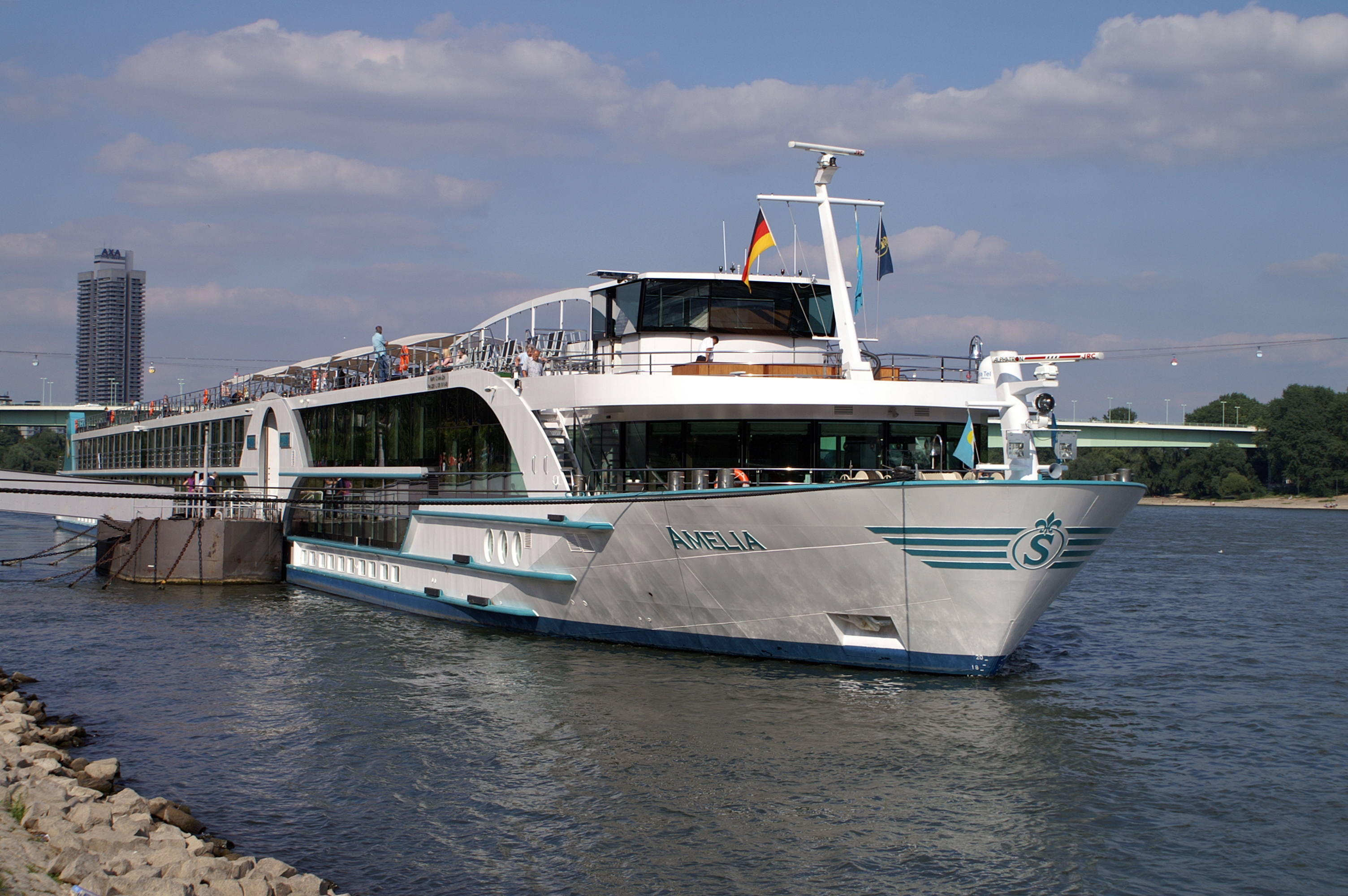 Flusskreuzfahrtschiff Amelia von Scylla Tours am Anleger Köln, Konrad-Adenauer-Ufer.